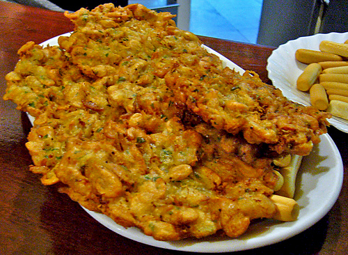 Plato típico